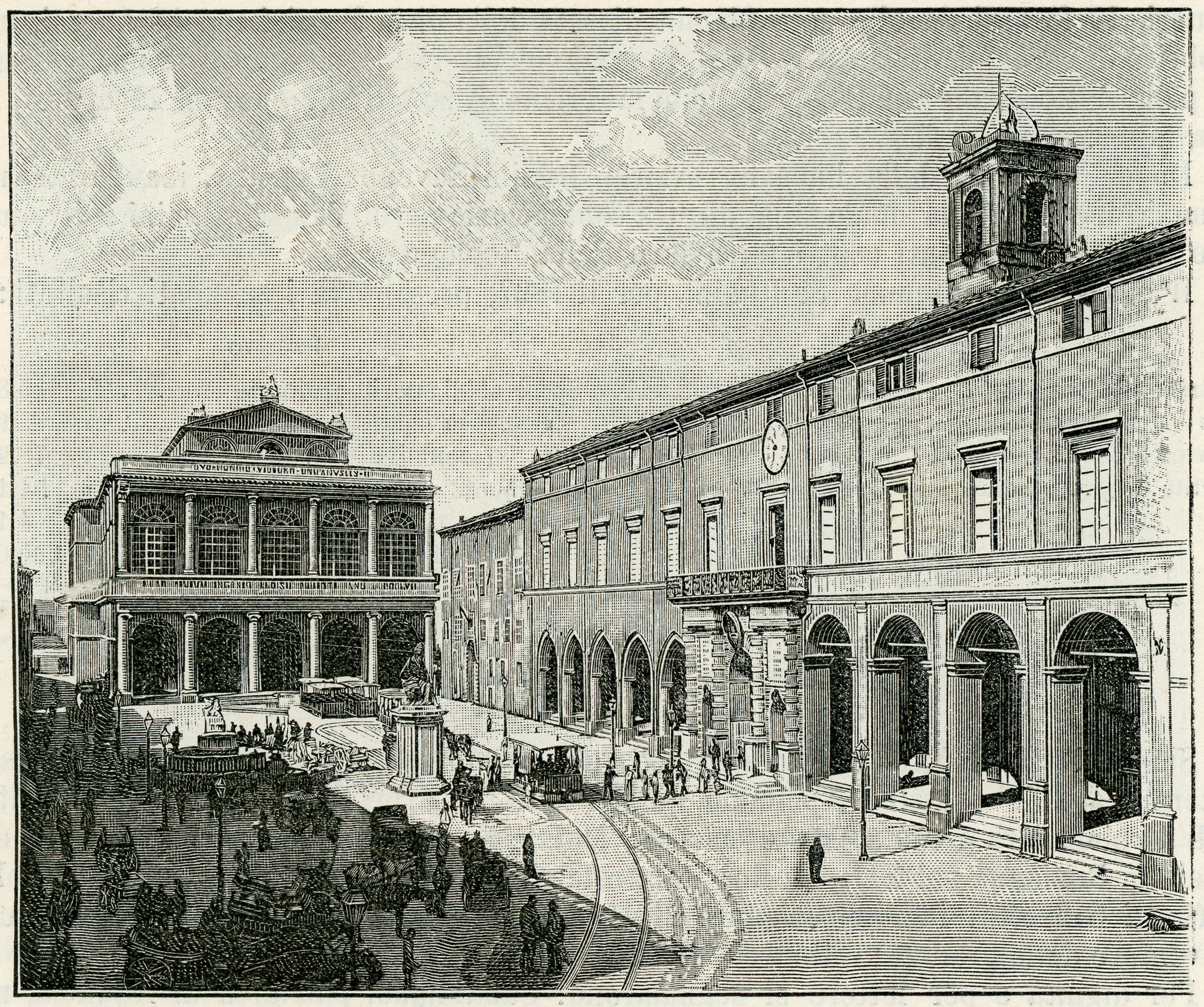 Rimini: piazza Cavour col Palazzo Comunale e Teatro Vittorio Emanuele, xilografia.